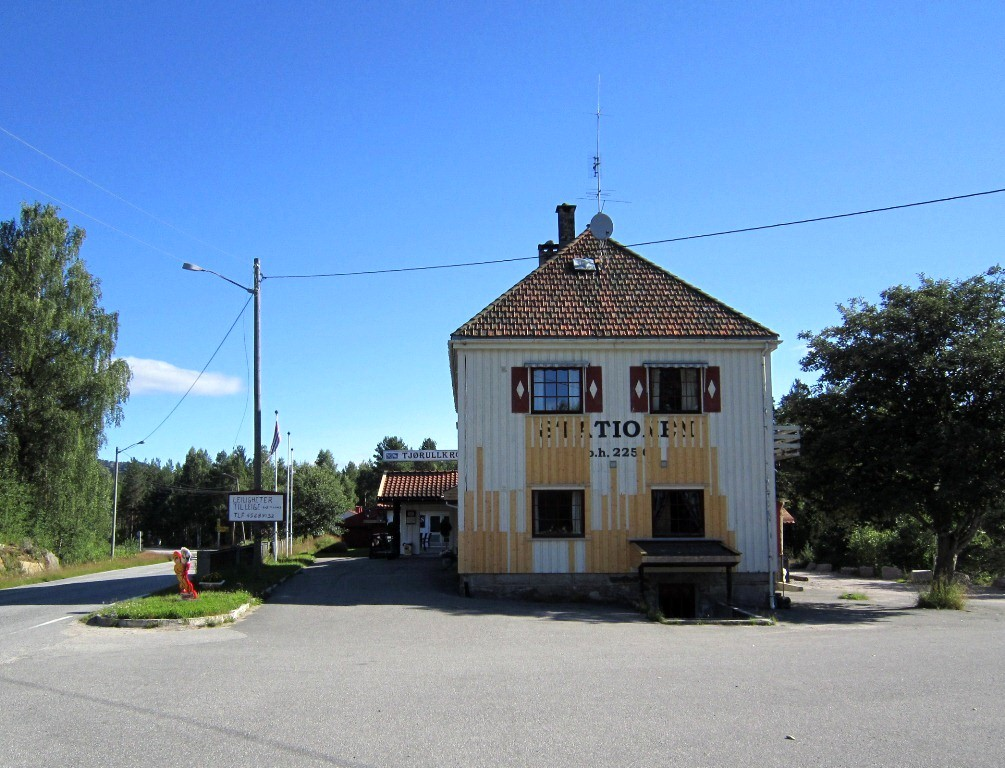 Tjønnesfoss stasjon ved den nedlagte Treungenbanen i 2012